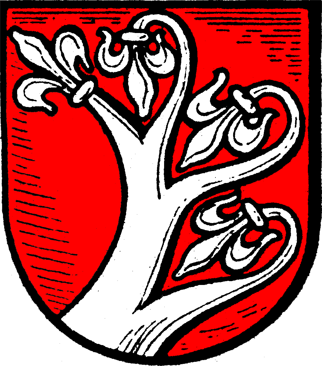 Wappen von Söhrewald (Gemeinde)